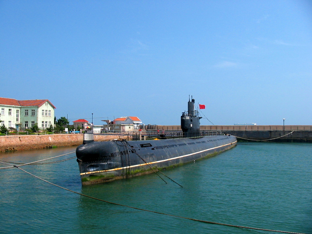 青岛海军博物馆 - 033型常规潜艇长城号（舷号237）